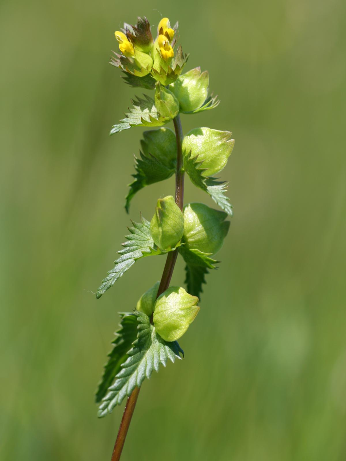 Kleiner Klappertop (Rhinanthus minor)